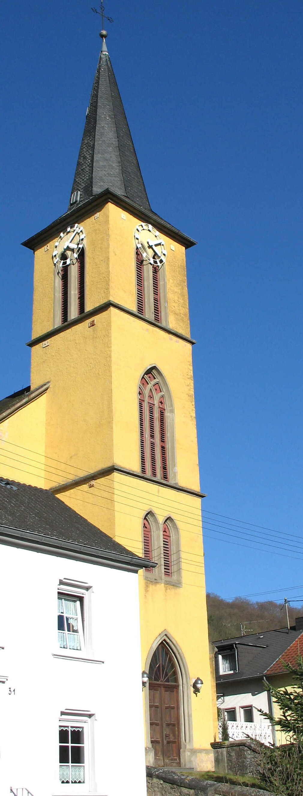 Kierch vu Mesenich (Mäerz 2006)